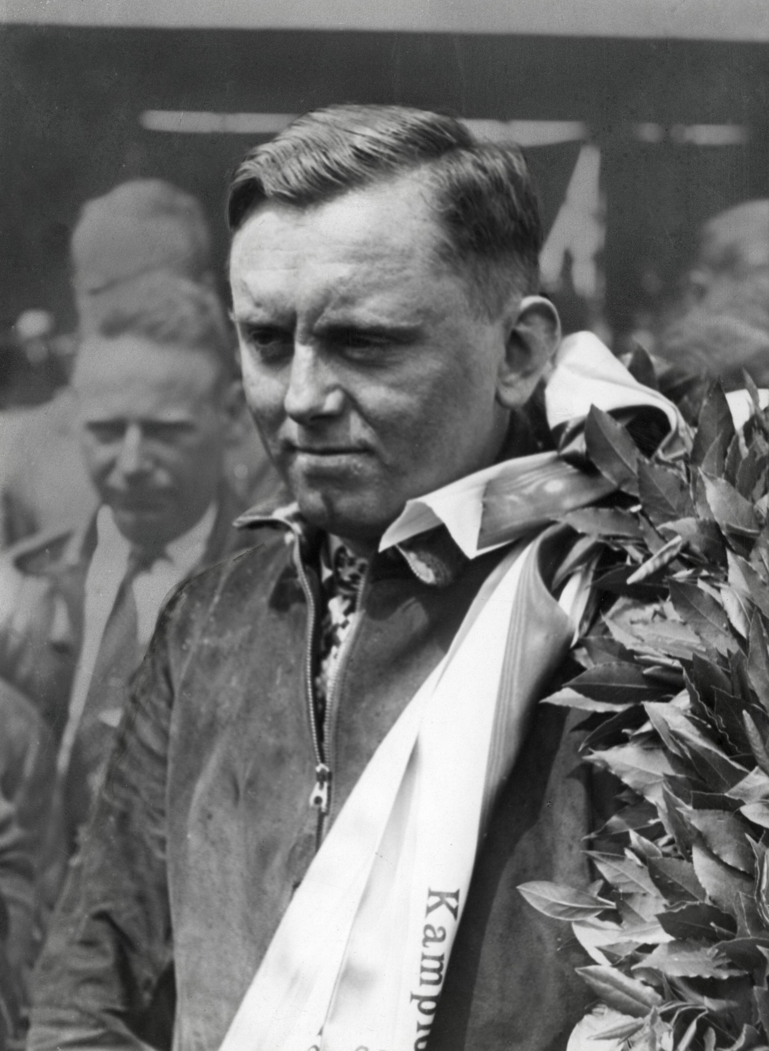 Motorsport. Internationale Motorraces TT (Tourist Trophy) in Assen 1933. Foto: Piet van Wijngaarden Nederlands kampioen 350 cc, op een Boston-motor.